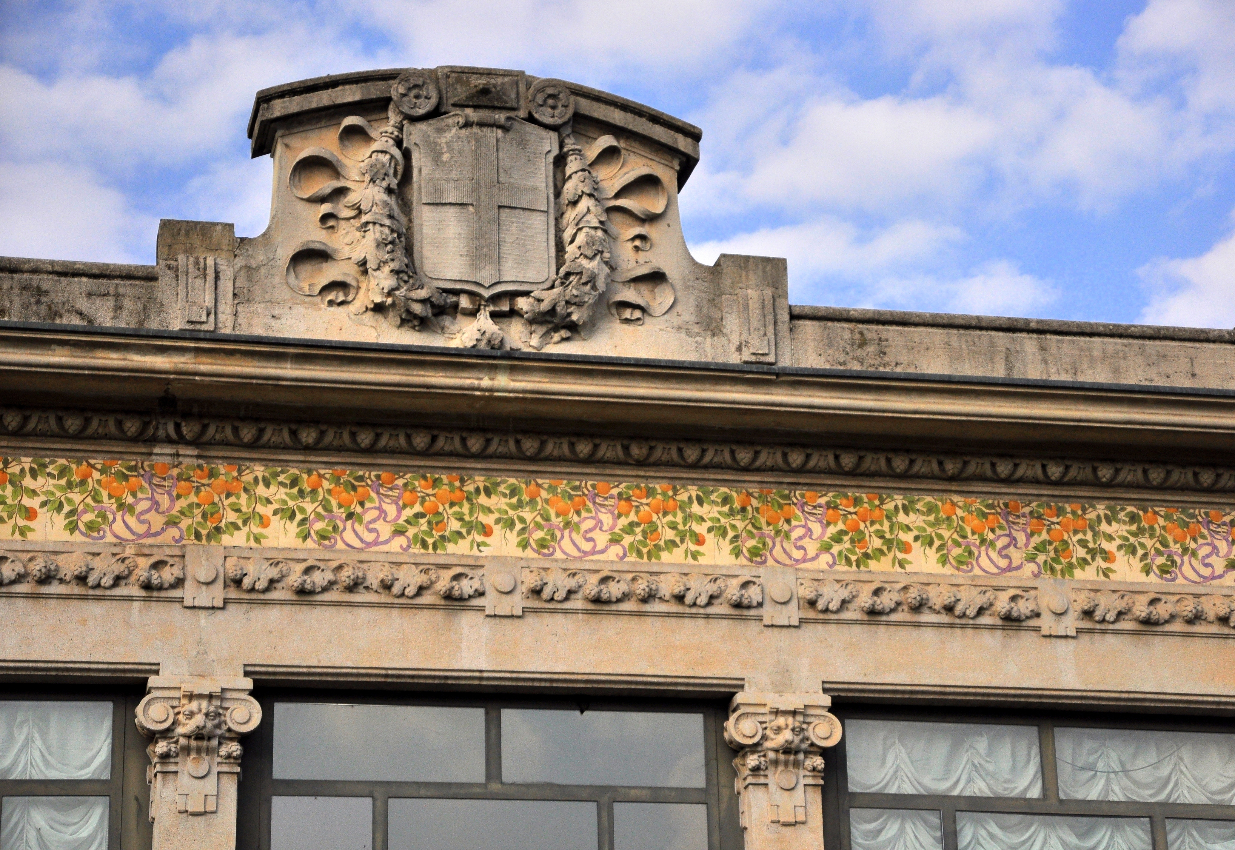 Palazzina Liberty, esterno This is a photo of a monument which is part of cultural heritage of Italy.